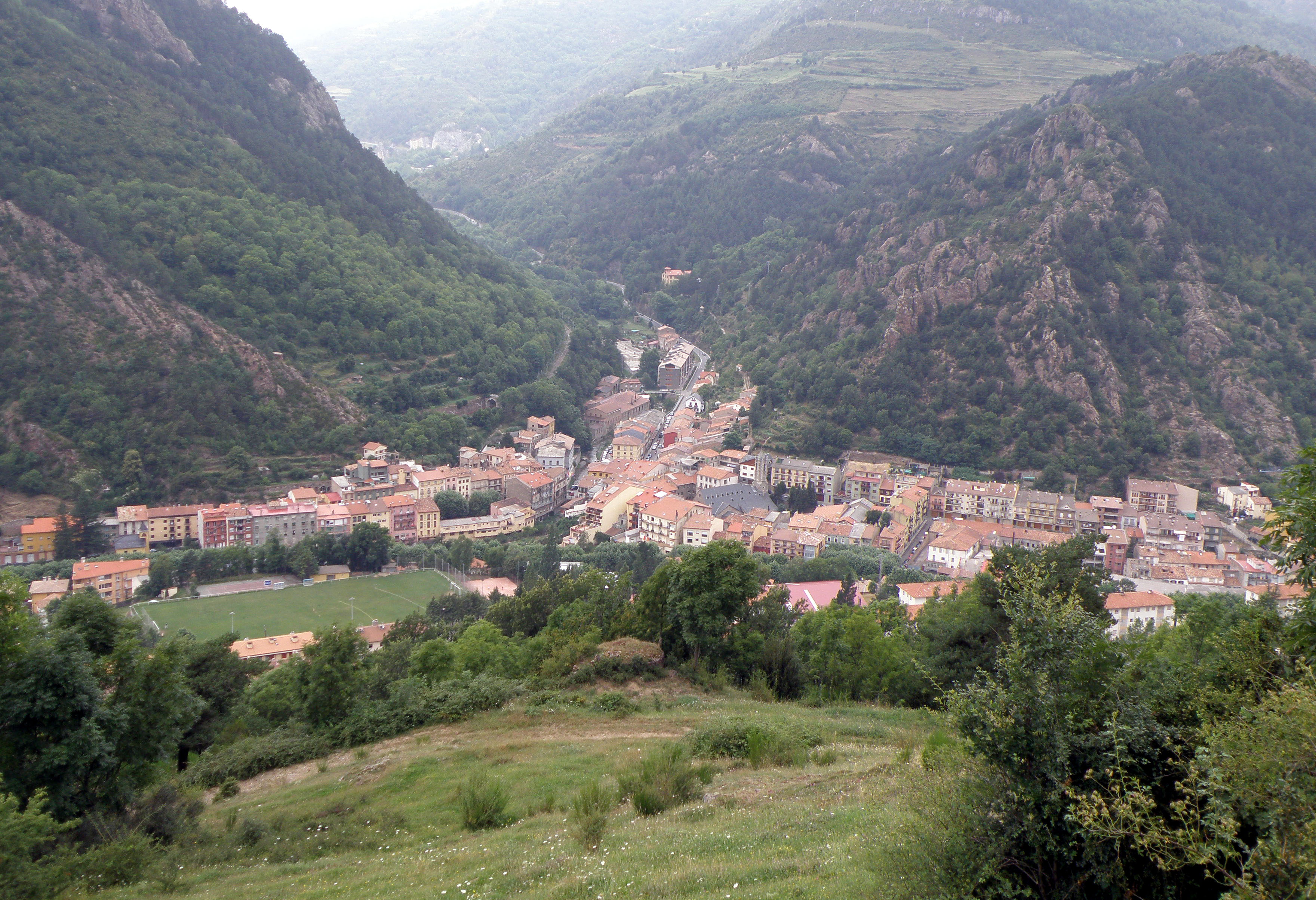 Ribes de Fresser visto desde la subida al Taga